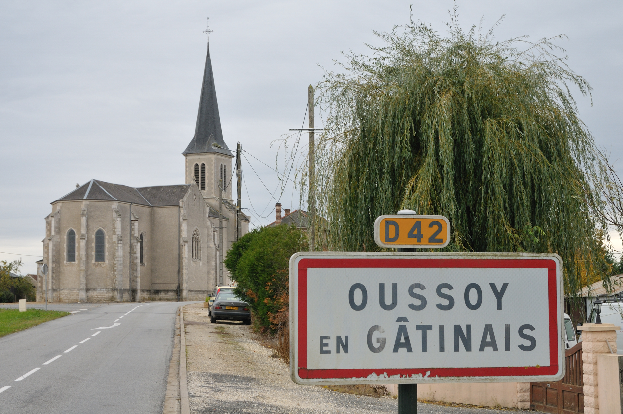 Entrée du village et église Saint-Pierre, Oussoy-en-Gâtinais, Loiret, France